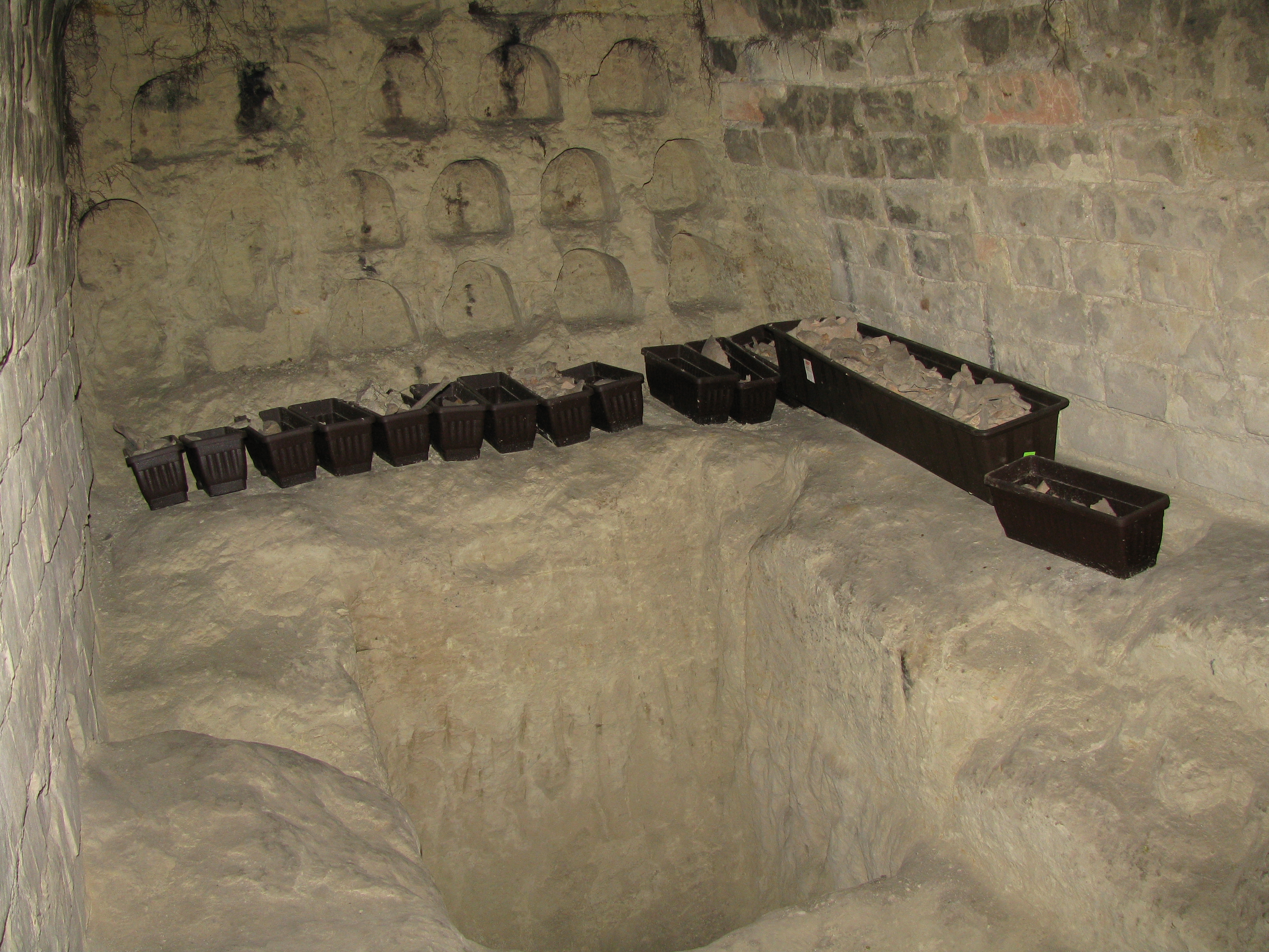 Феодосієви печери та фундаменти церкви Гнилецького монастиря, Київ, Церковщина уроч.